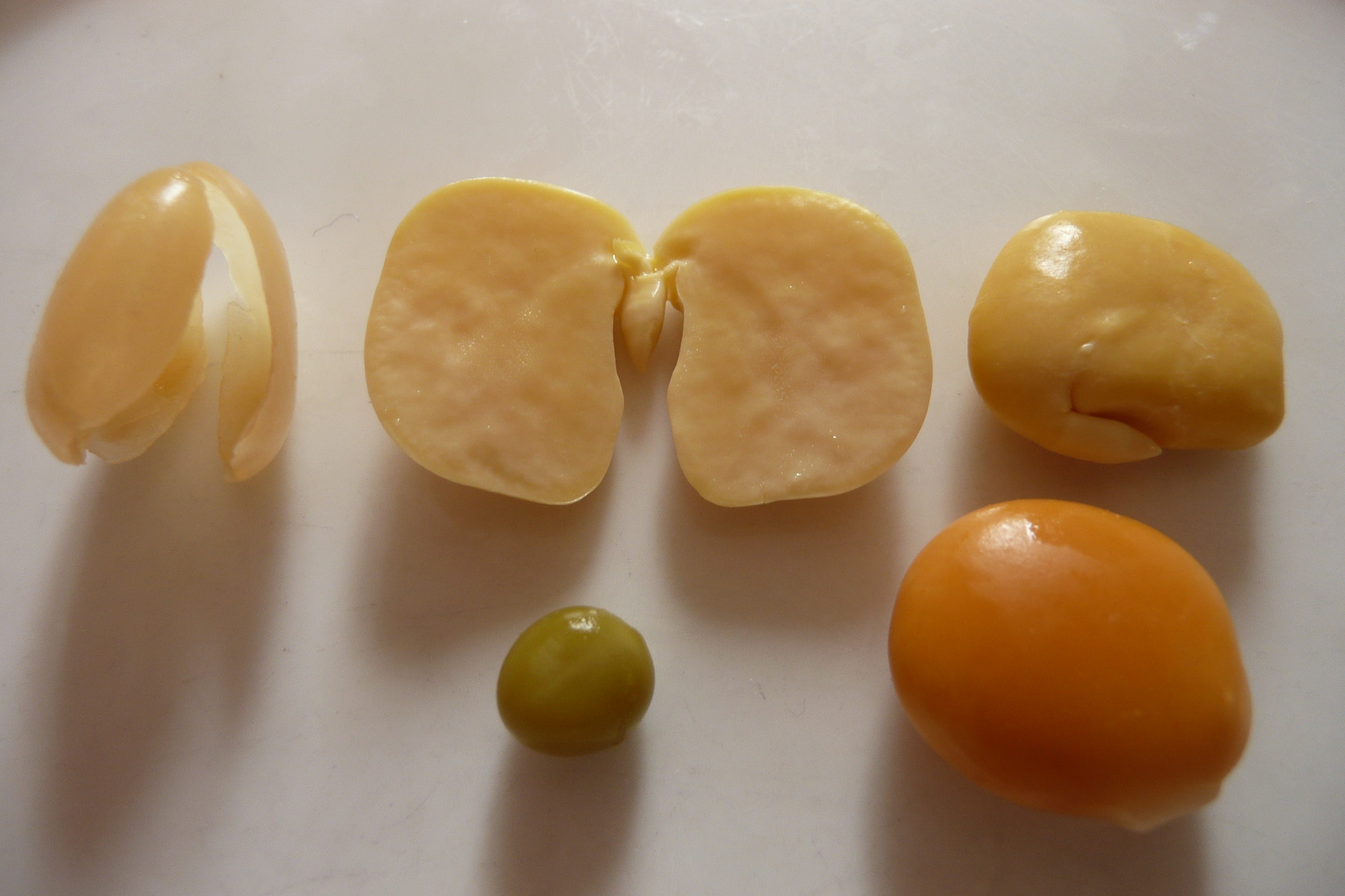 Lupin jaune, peau, lupin sans sa peau, petit pois, lupin intact (avec peau)